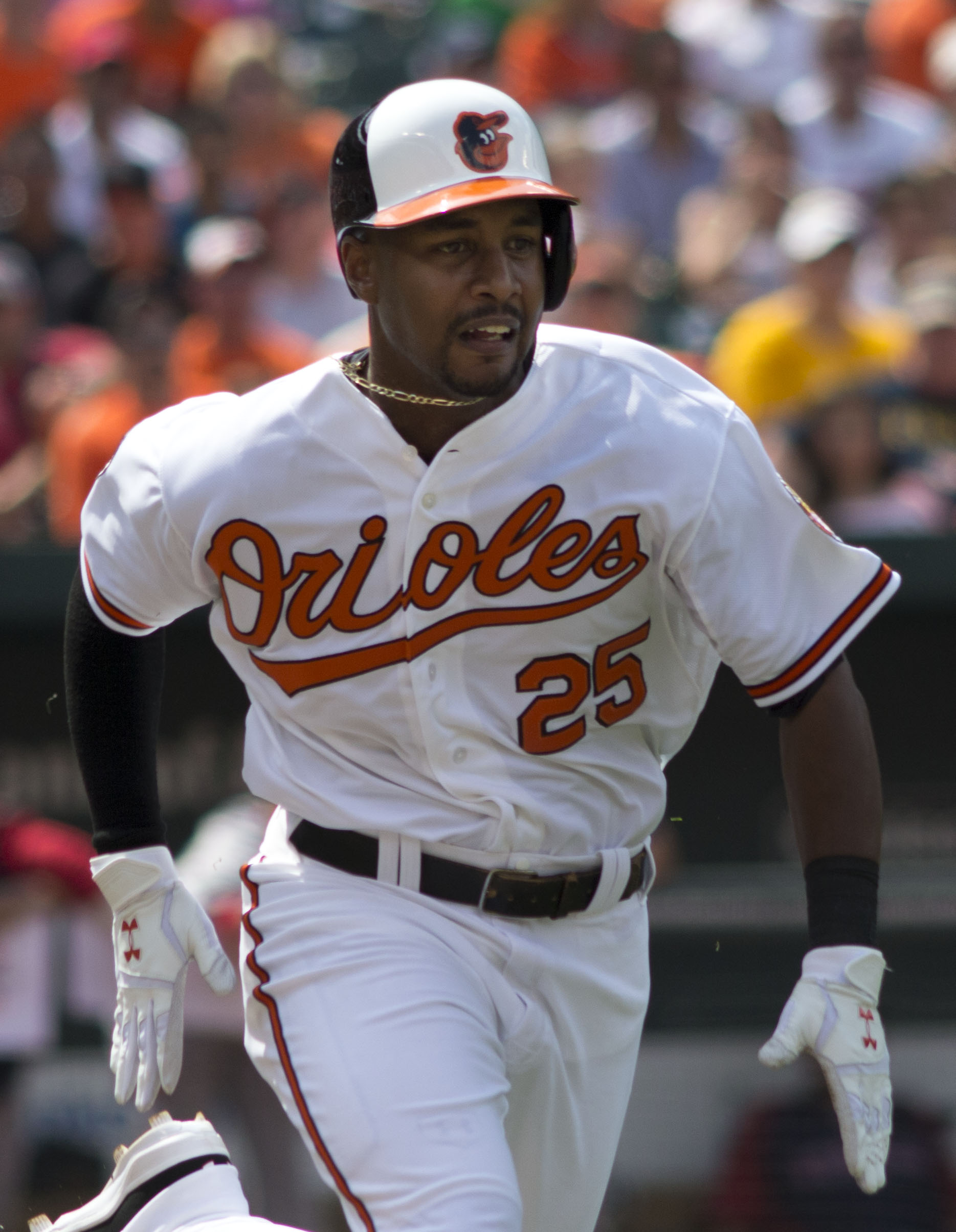 L. J. Hoes